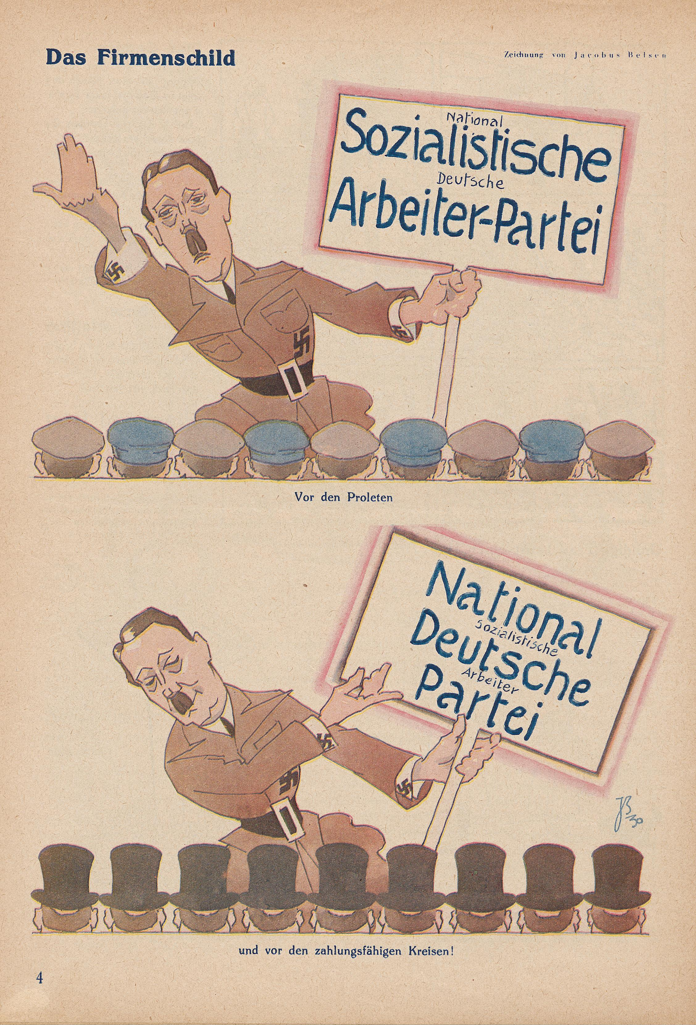 Das Firmenschild Vor den Proleten: "Sozialistische Arbeiter-Partei" / "National Sozialistische Deutsche Arbeiter-Partei" und vor den zahlungsfähigen Kreisen!: "National Deutsche Partei" / "National Sozialistische Deutsche Arbeiter Partei"